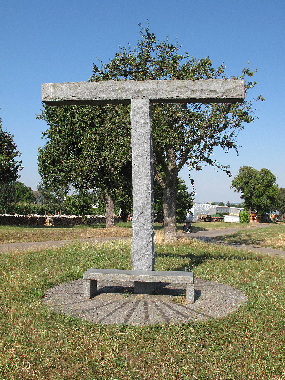 Inge Mahn, Zeit, 2001 (Detail), – Baden-Württemberg, Rems-Murr-Kreis, Fellbach